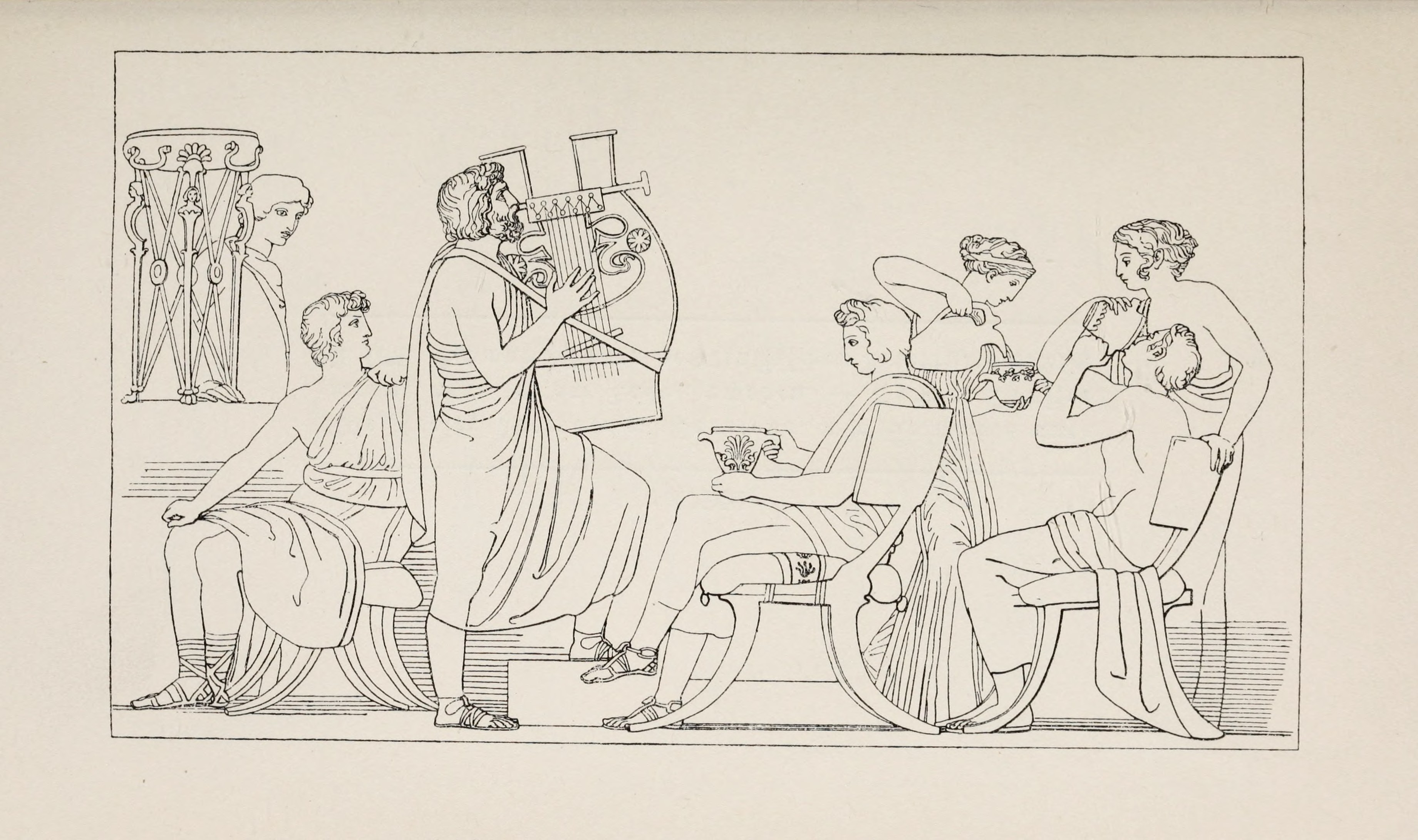 Der Sänger Phemios singt den Freiern. – Homer, Odyssee I. 325. Schwab, Sagen des klassischen Altertums II. 208.